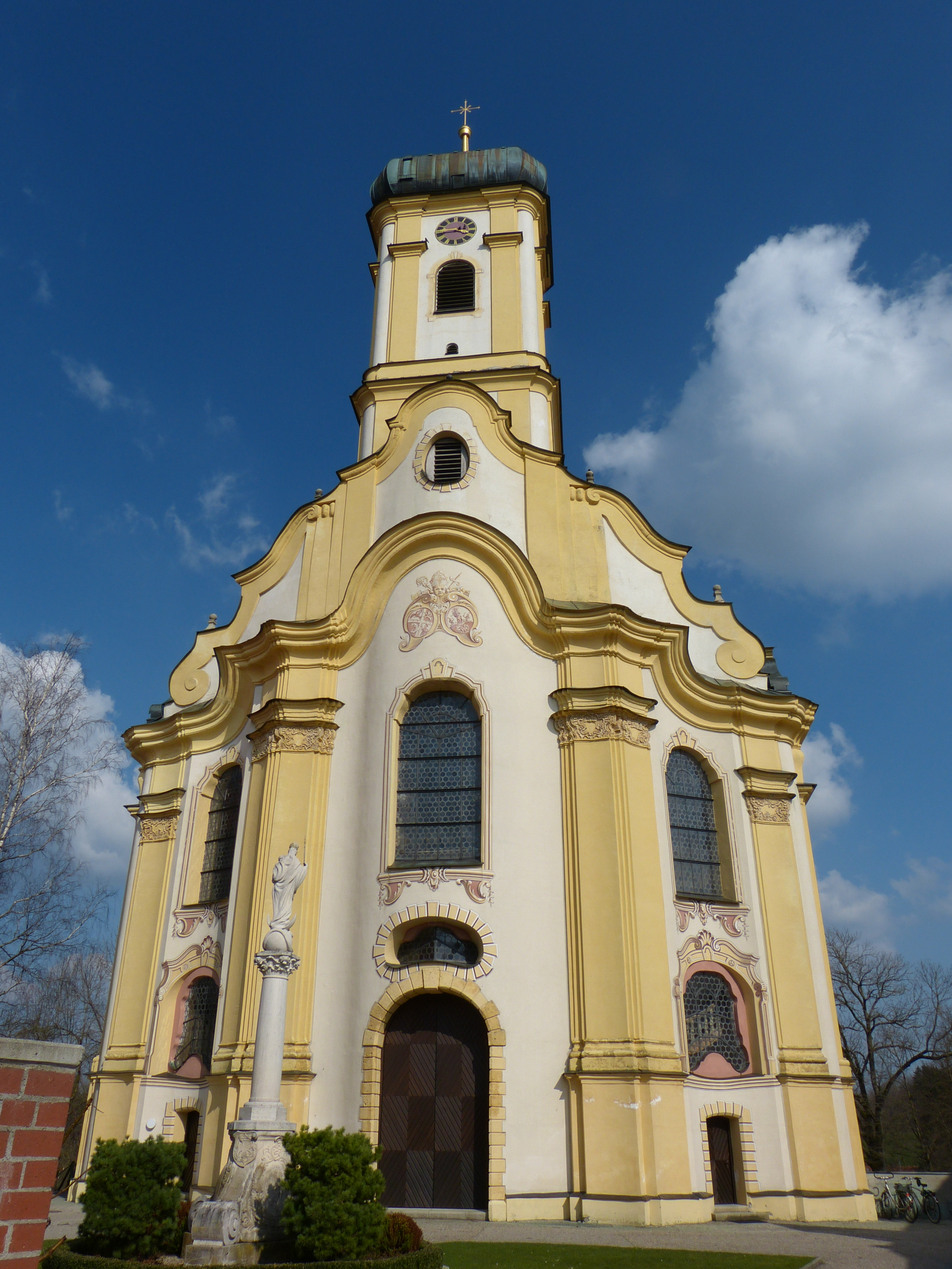 Baudenkmal in Maria Steinbach bei Legau, Landkreis Unterallgäu, Bayern